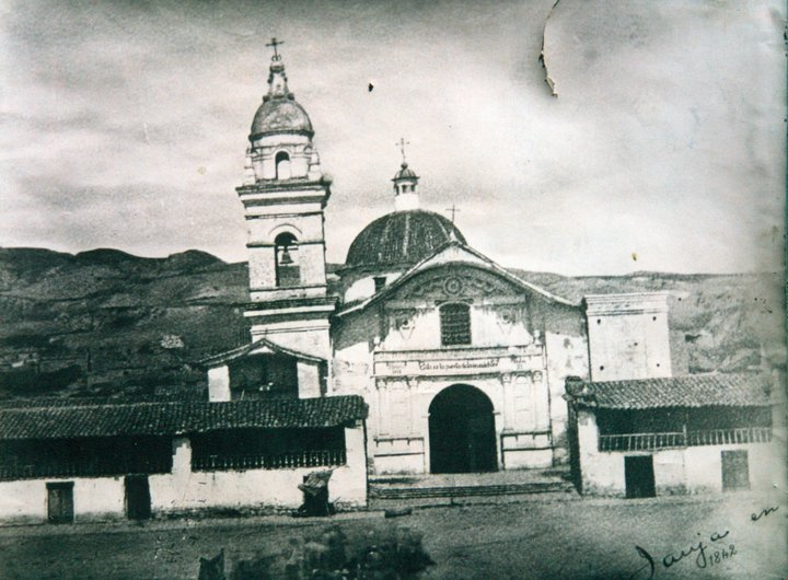 Parish Santa Fe of Jauja, Peru